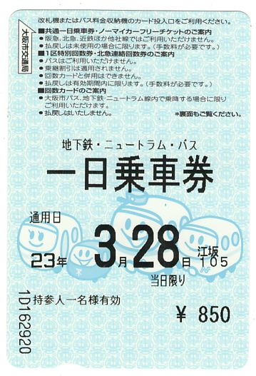 大阪市交通局の旧・一日乗車券（2011年10月1日廃止）。